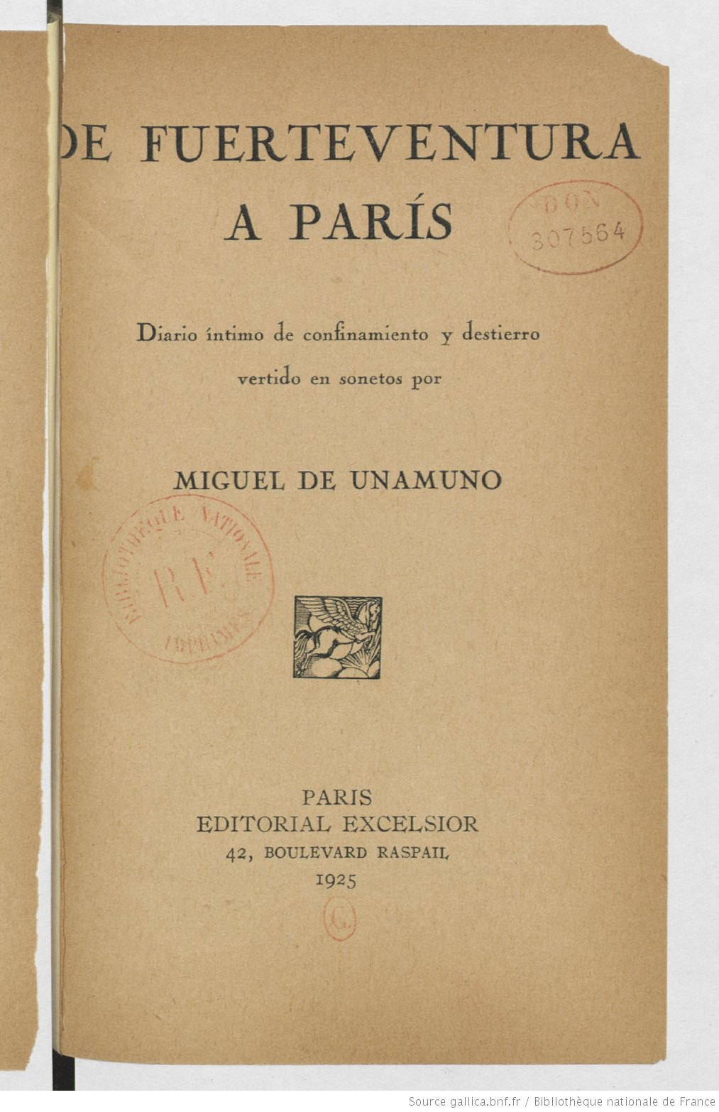 De Fuerteventura a París, diario íntimo de confinamiento y destierro vertido en sonetos por Miguel de Unamuno